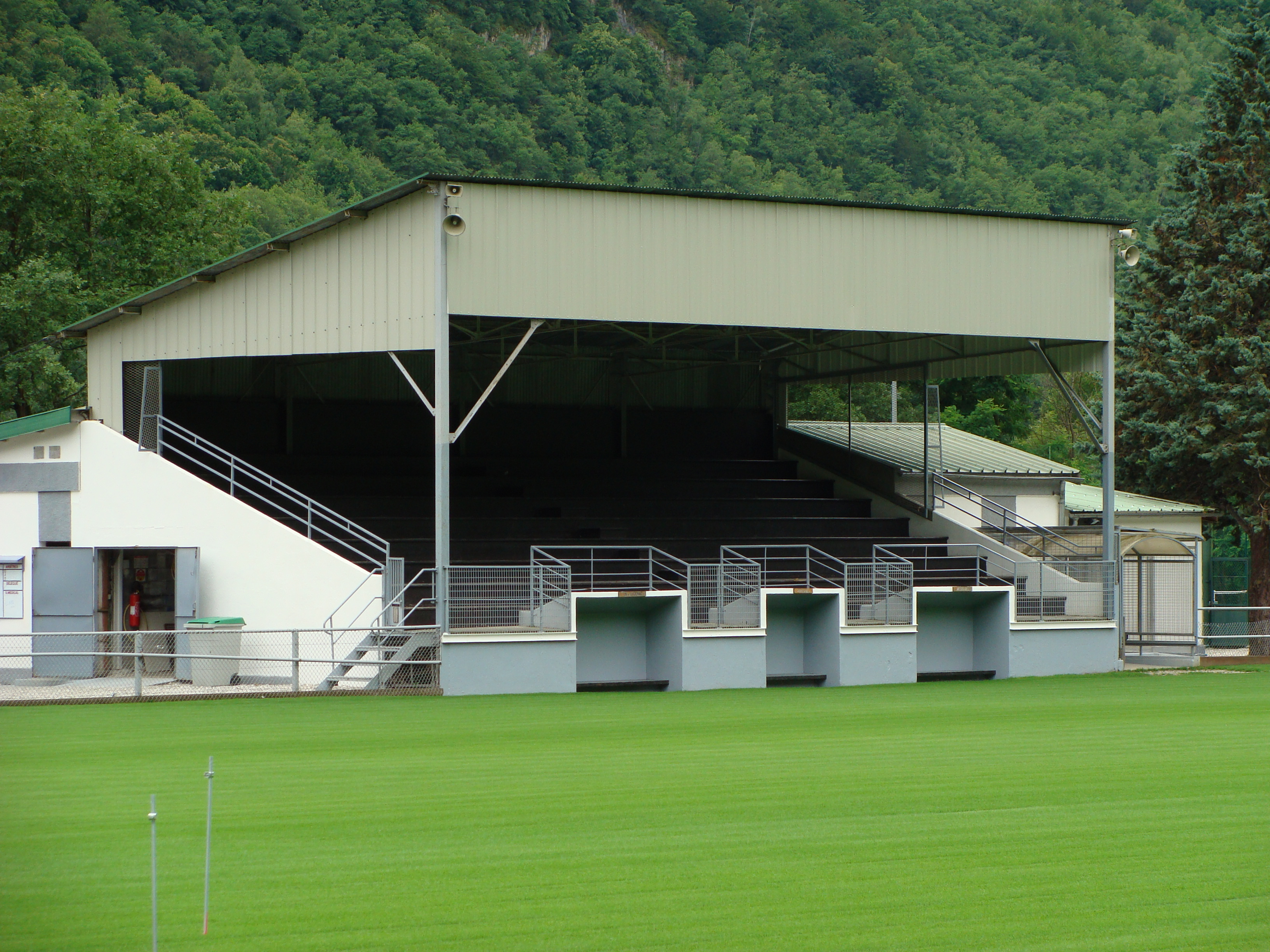 Frankreich: Stadion in Luzenac